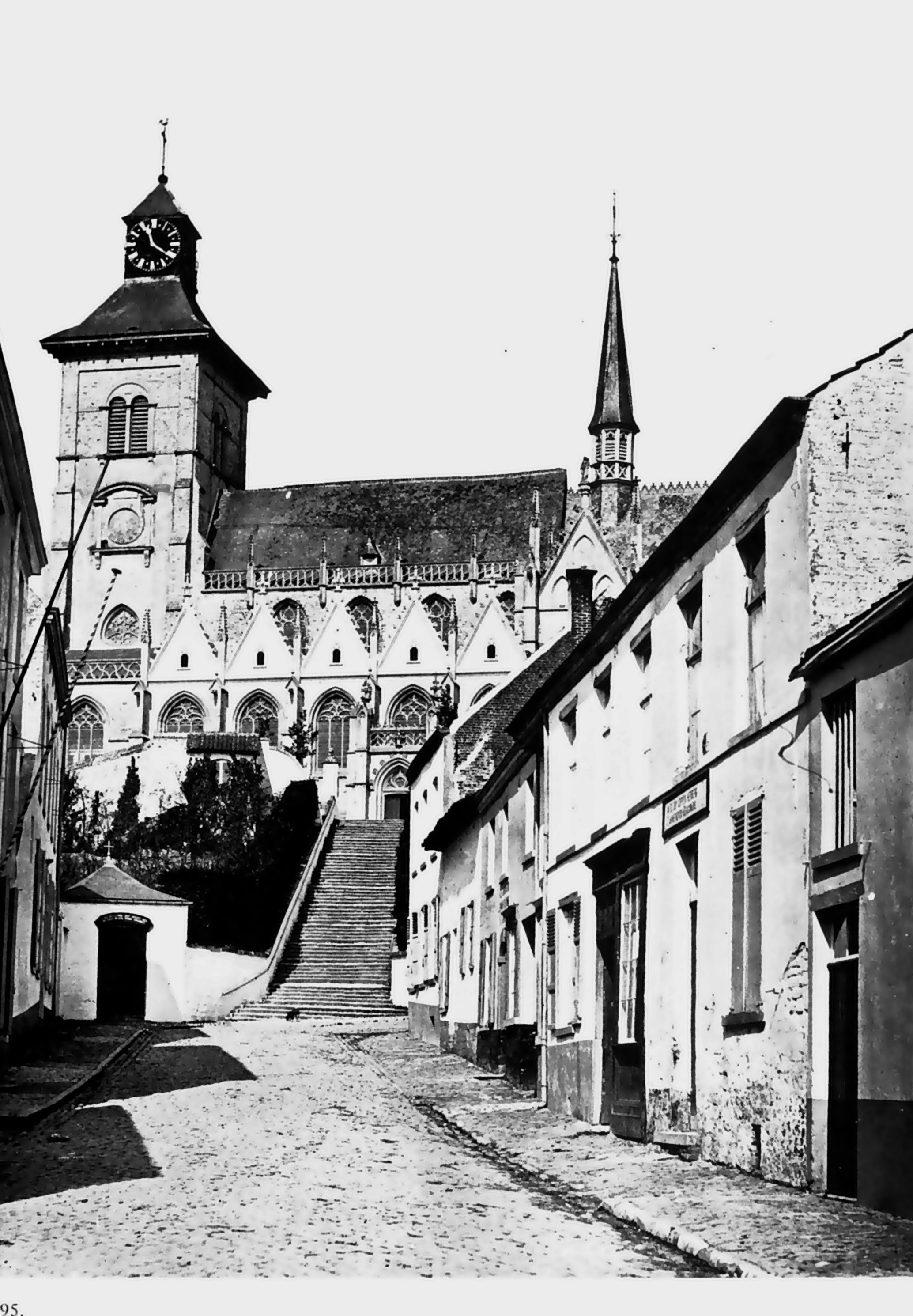 Alsemberg